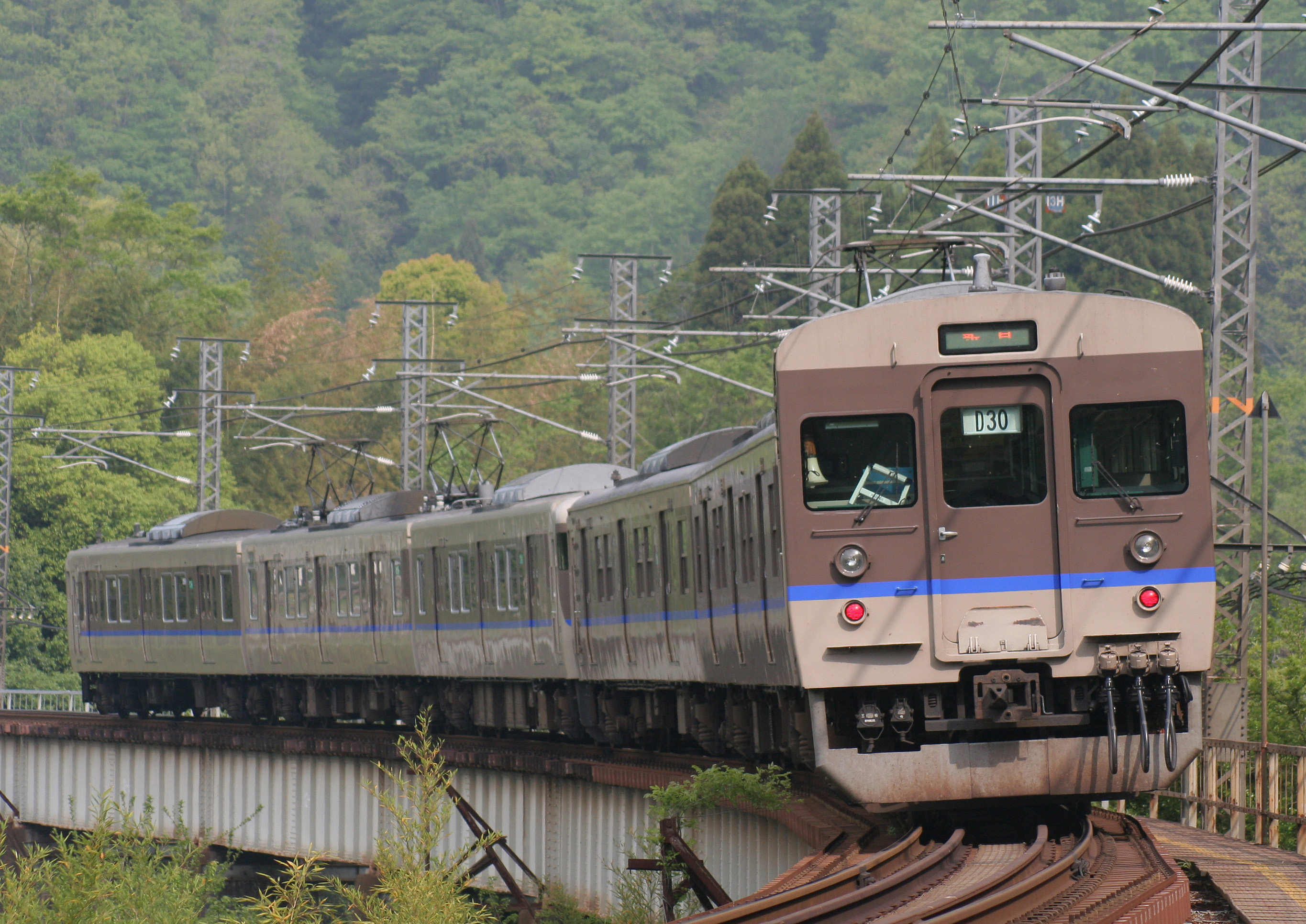 JR西日本115系電車D30編成（伯備線、備中川面 - 方谷）第3高梁川橋梁